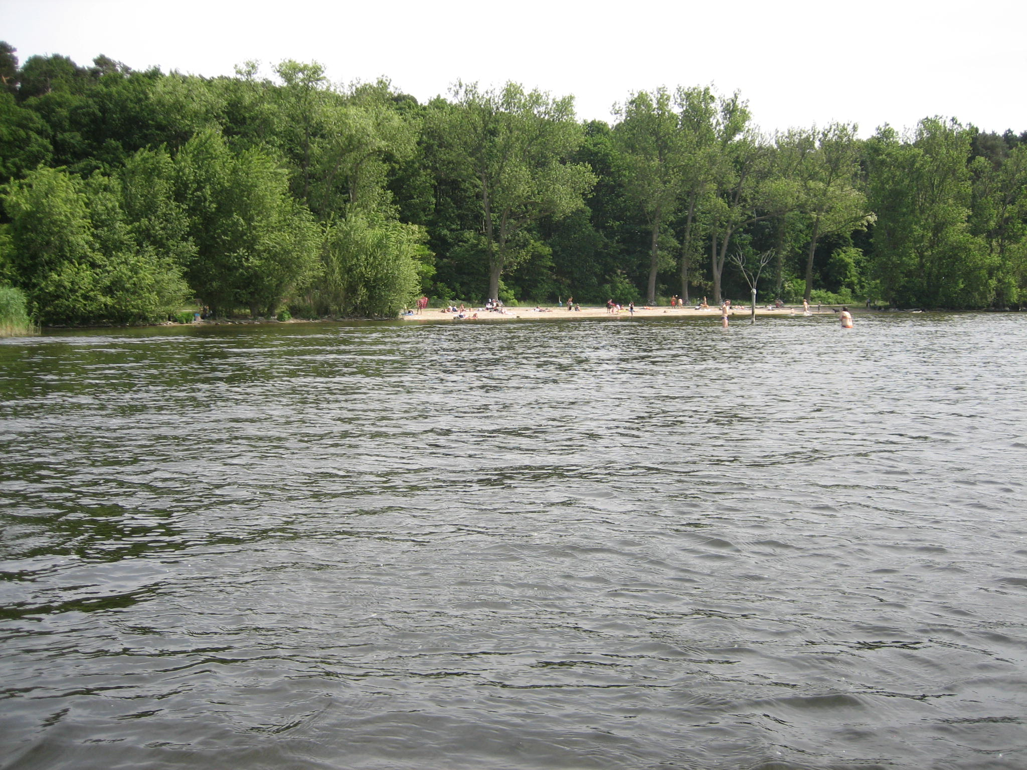 Die Badestelle Großes Fenster / Große Steinlanke vom Wasser aus